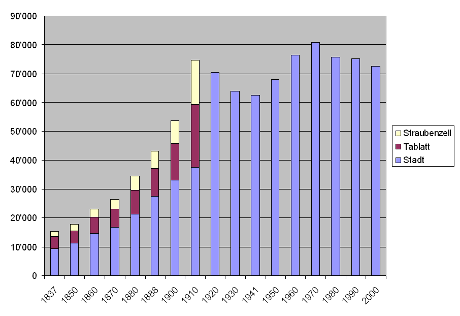 Bevölkerungsentwicklung von St. Gallen im 19. und 20. Jahrhundert